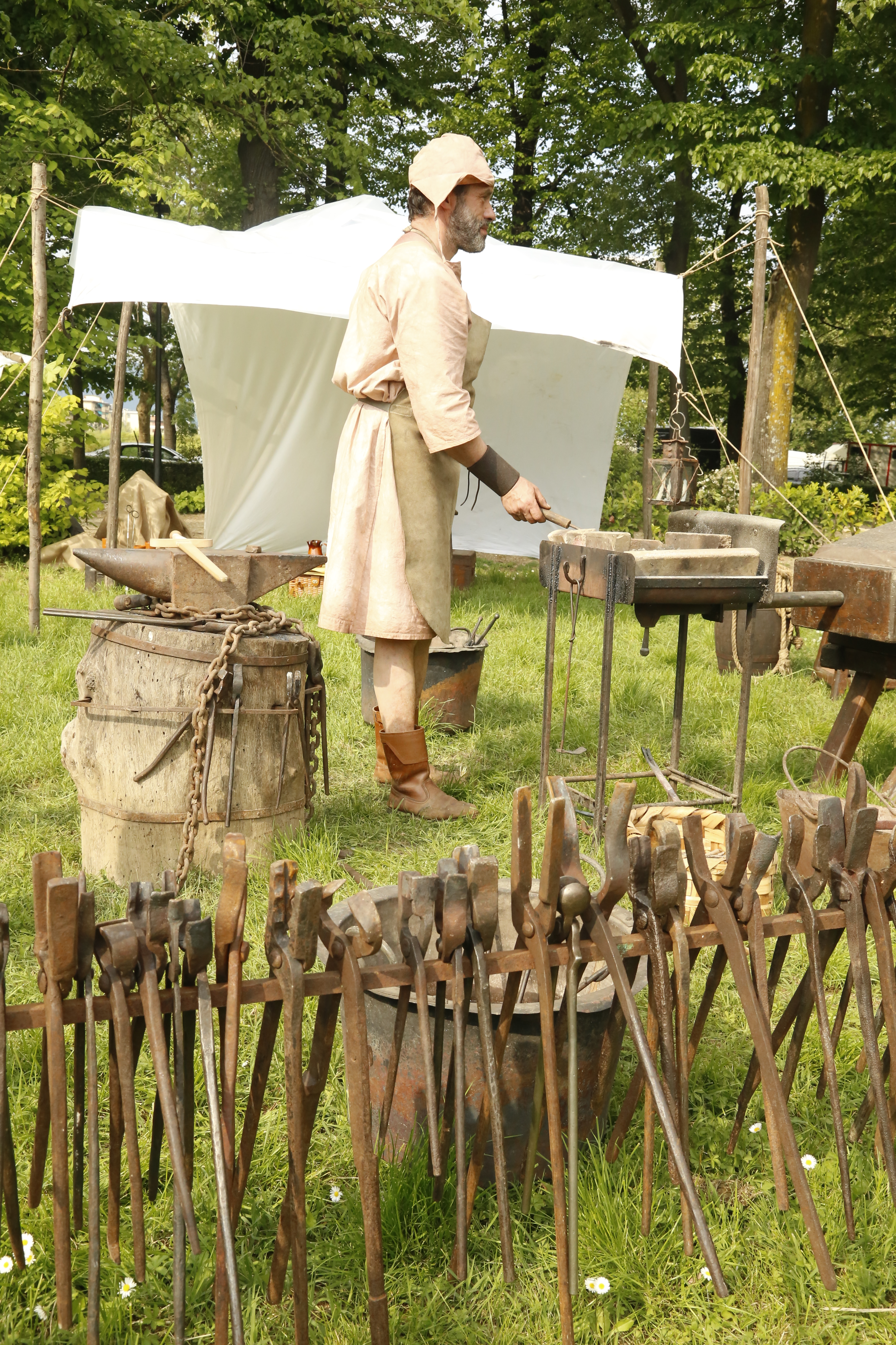 Fabbro rinascimentale